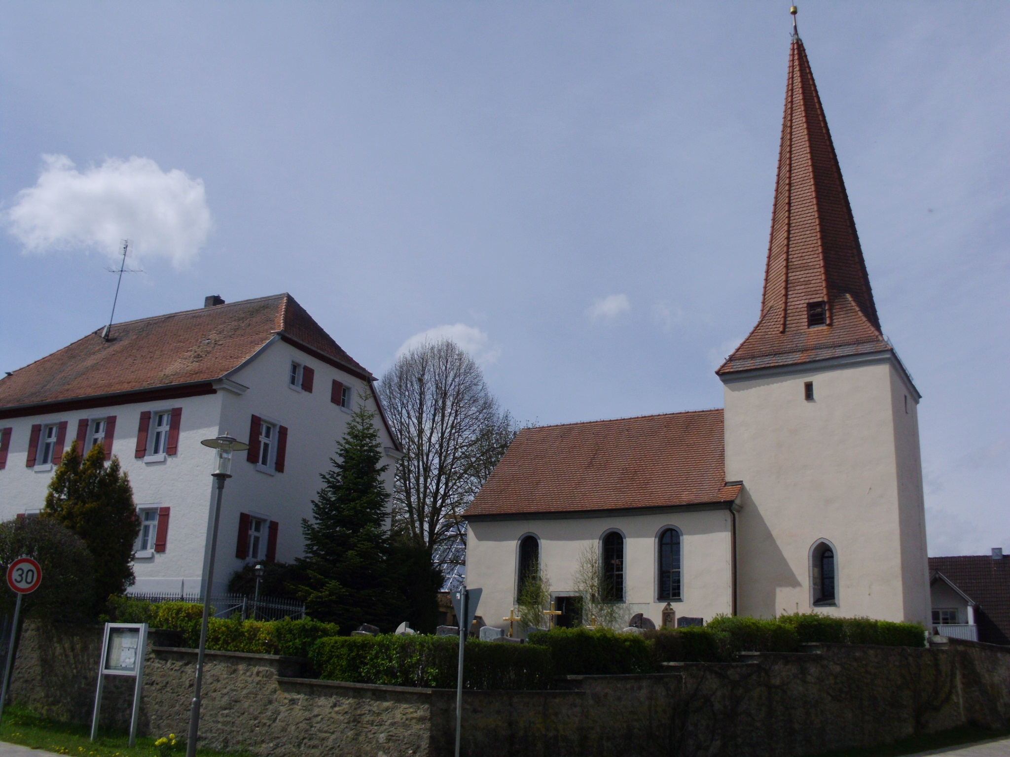 Pflaumfeld, Gemeindeteil von Gunzenhausen im mittelfränkischen Landkreis Weißenburg-Gunzenhauen (Bayern), Kirche